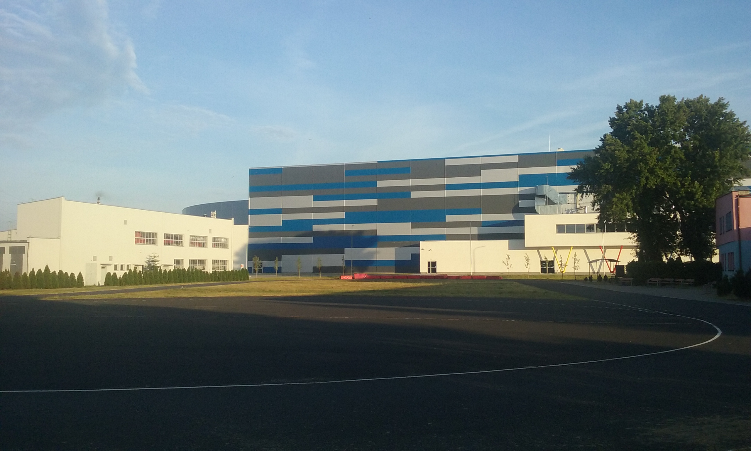 Tor rolkarski na tyłach "Areny Lodowej Tomaszów Mazowiecki"